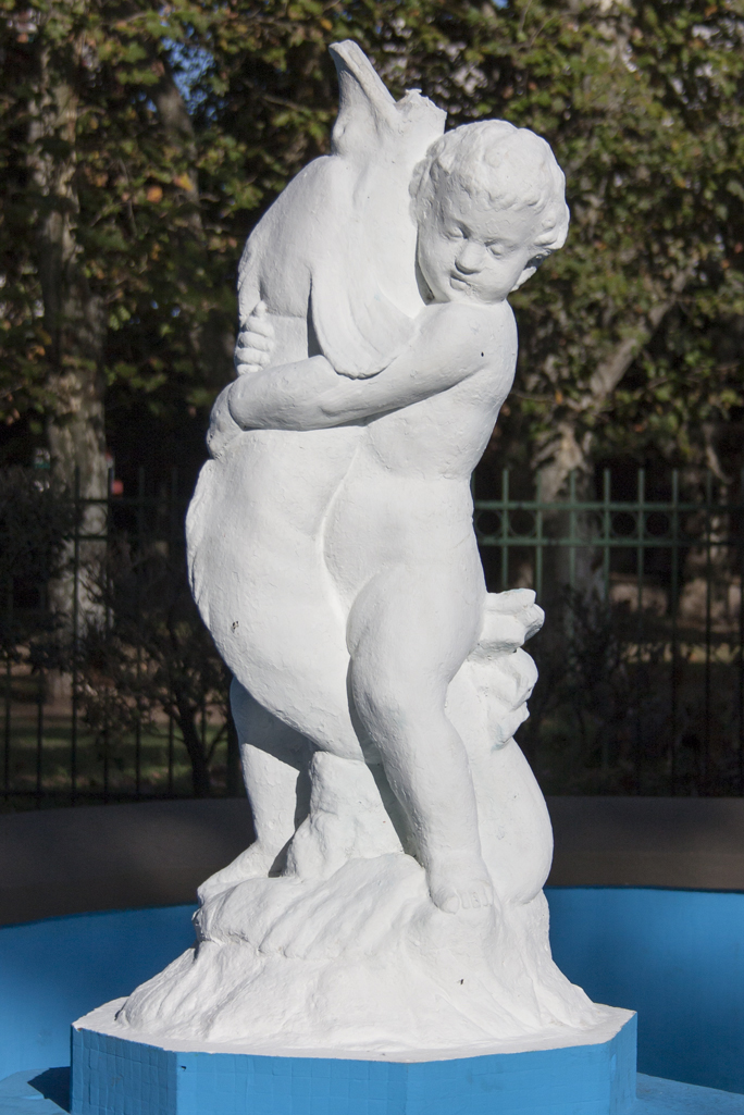 Estatua de autor anónimo en la nueva fuente de los sapitos de Parque Chacabuco. Buenos Aires, Argentina.